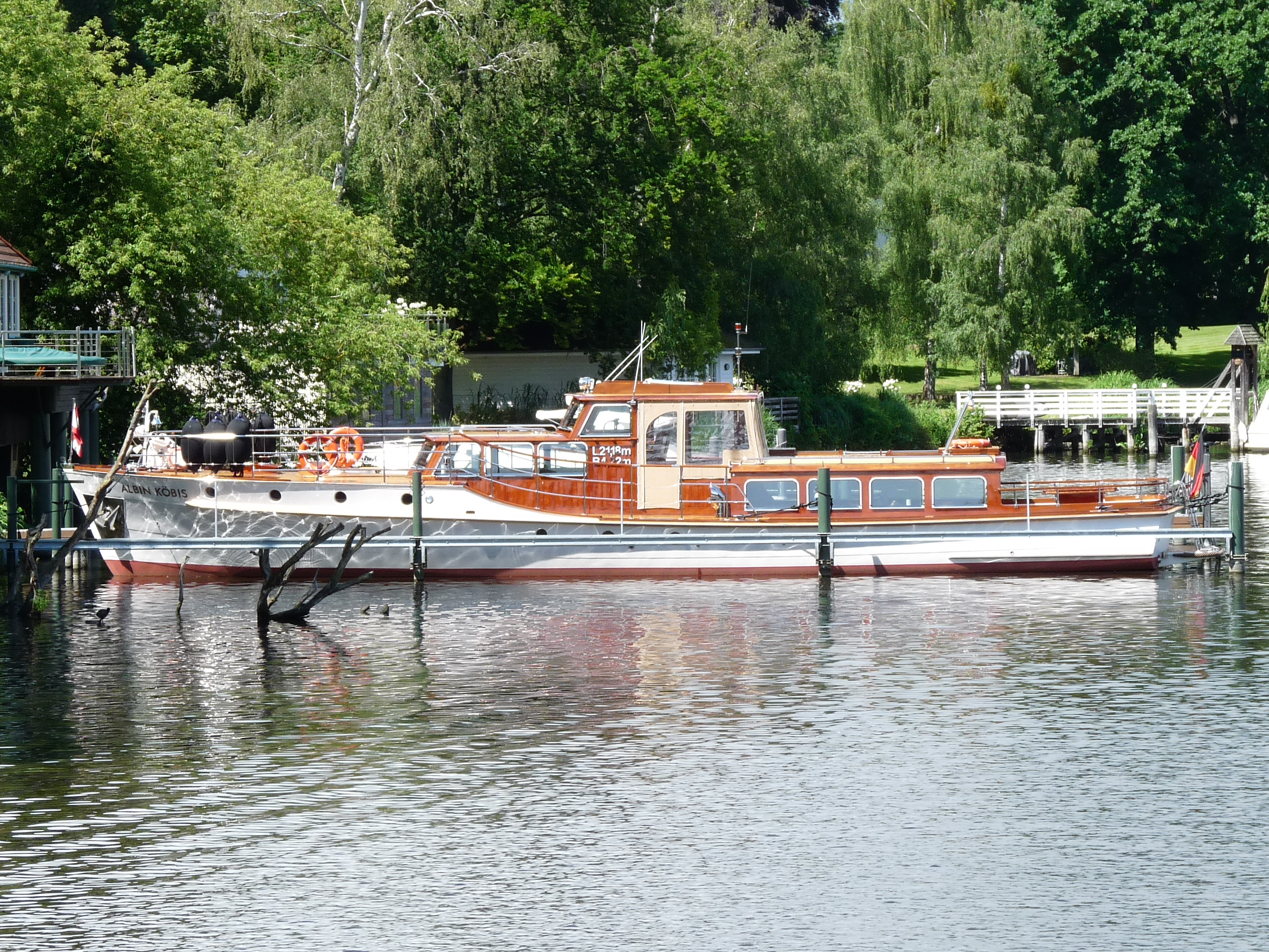 Die Yacht wurde 1952 als eines von drei Booten des Projektes 977 „Reisemotoryacht 20m“ im Auftrag Wilhelm Piecks als DDR-Staatsyacht bei der VEB Yachtwerft in Berlin-Köpenick gebaut.